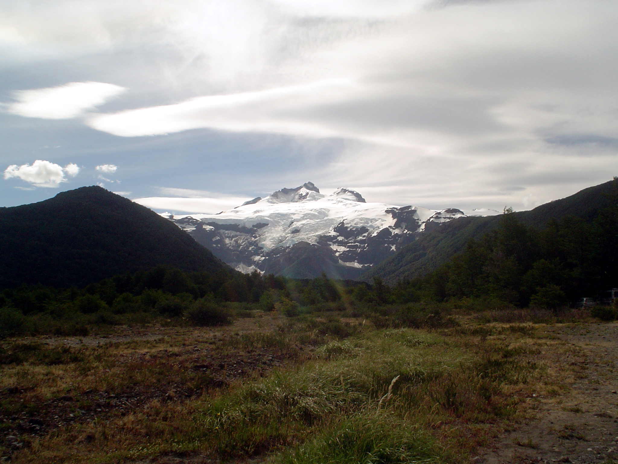 Vista del Cerro Tronador desde Pampa Linda, enero 2007, Río Negro, Argentina.